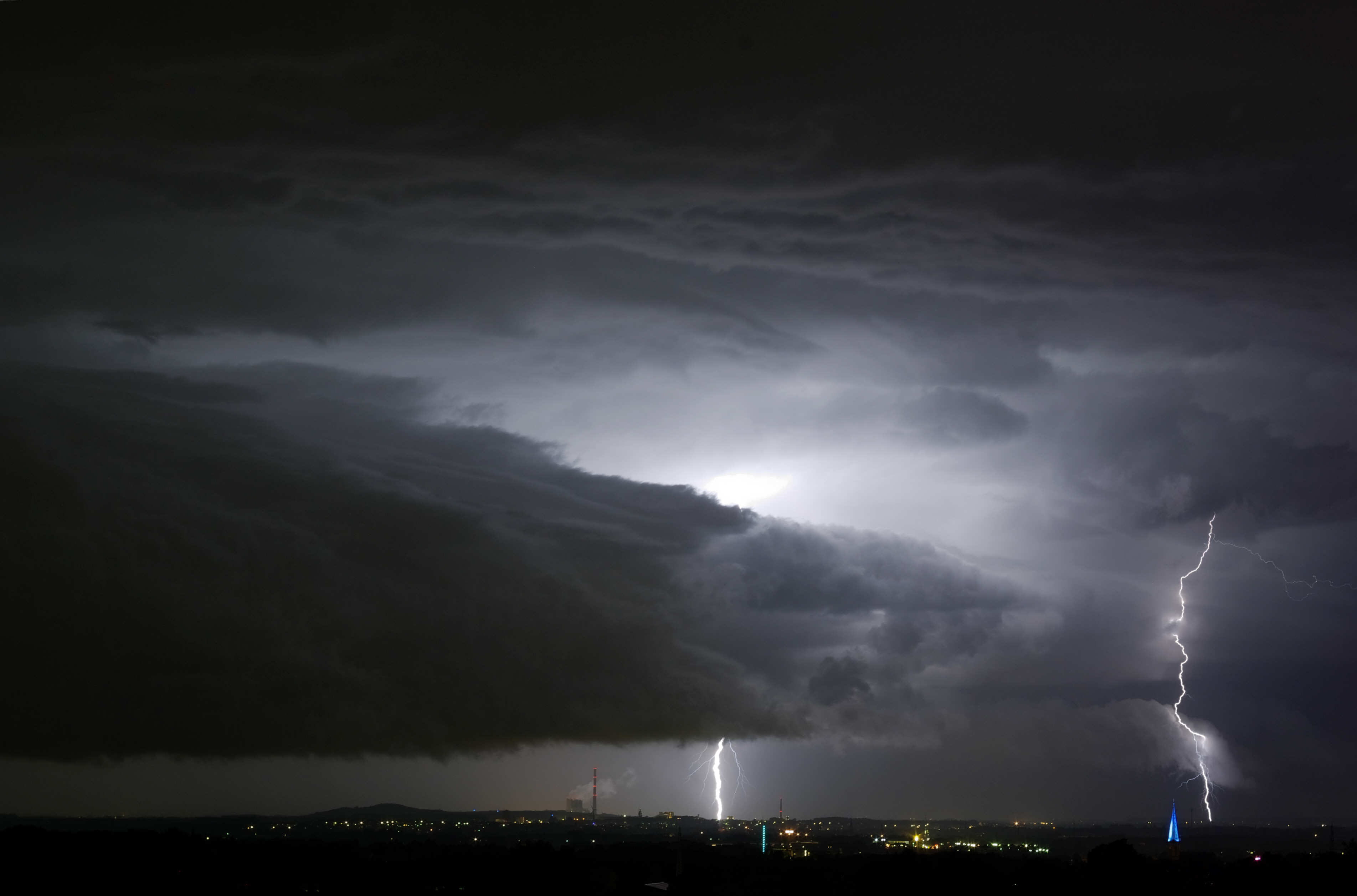 Gewitter über Unna, Deutschland